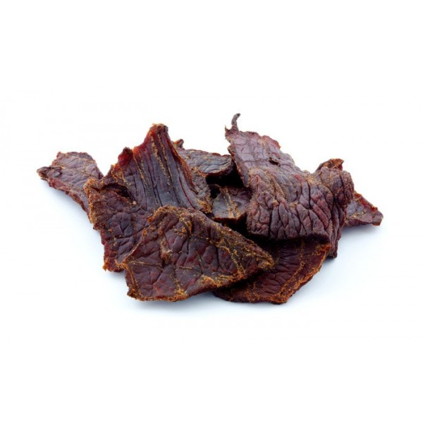 Beef Jerky is lucht gedroogd rundsvlees. Het woord "jerky" komt van de Quechua term "charqui", wat "gedroogd vlees" betekent. Beef Jerky is eigenlijk een methode van vroeger om eten zonder koeling te bewaren. In Zuid-Afrika wordt het ook gerookt en gedroogd. Daar noemt men het "biltong".